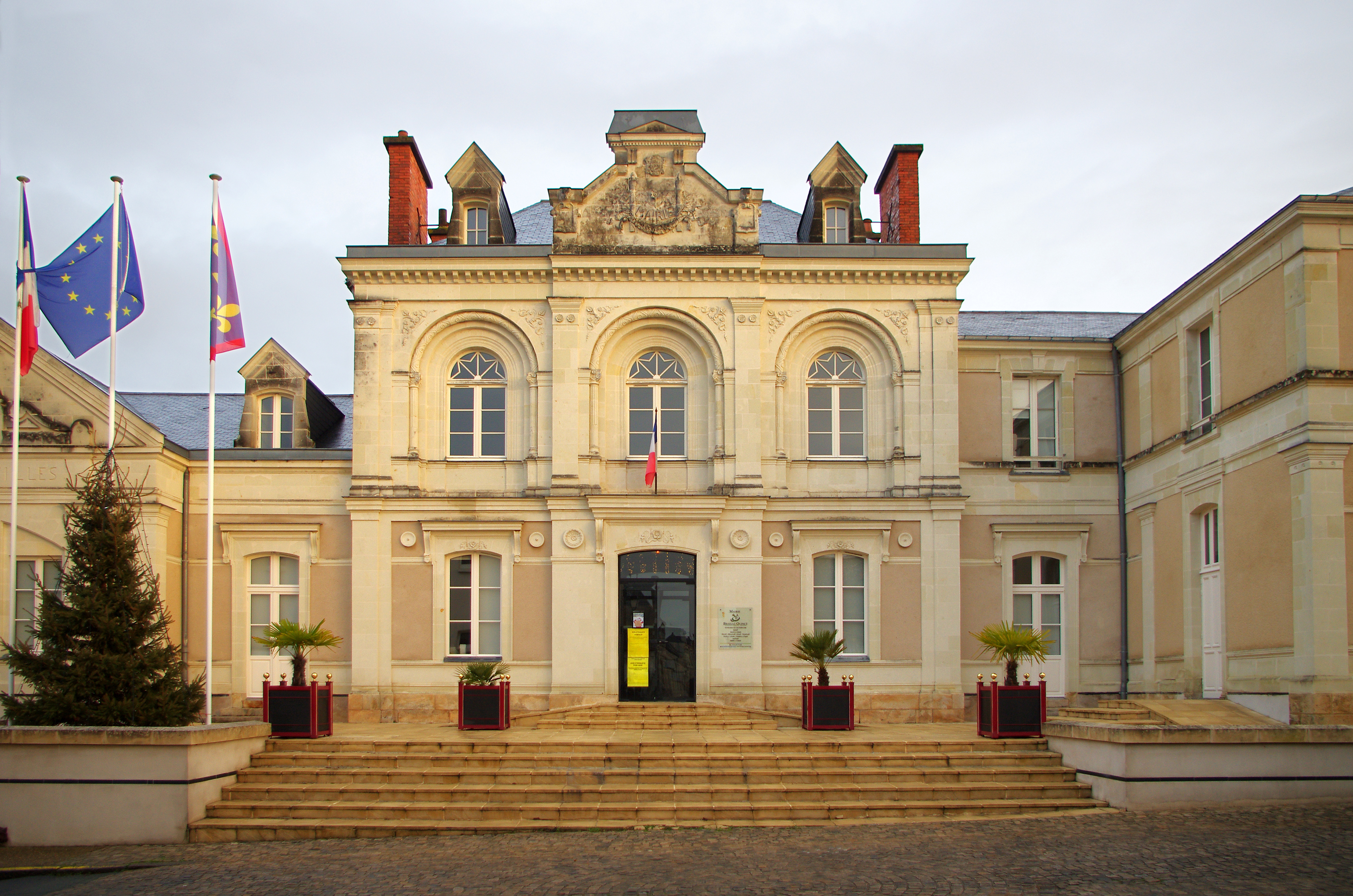 La mairie de Brissac-Quincé. La façade a été restaurée en 1997.